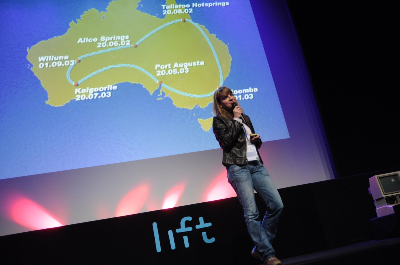 by